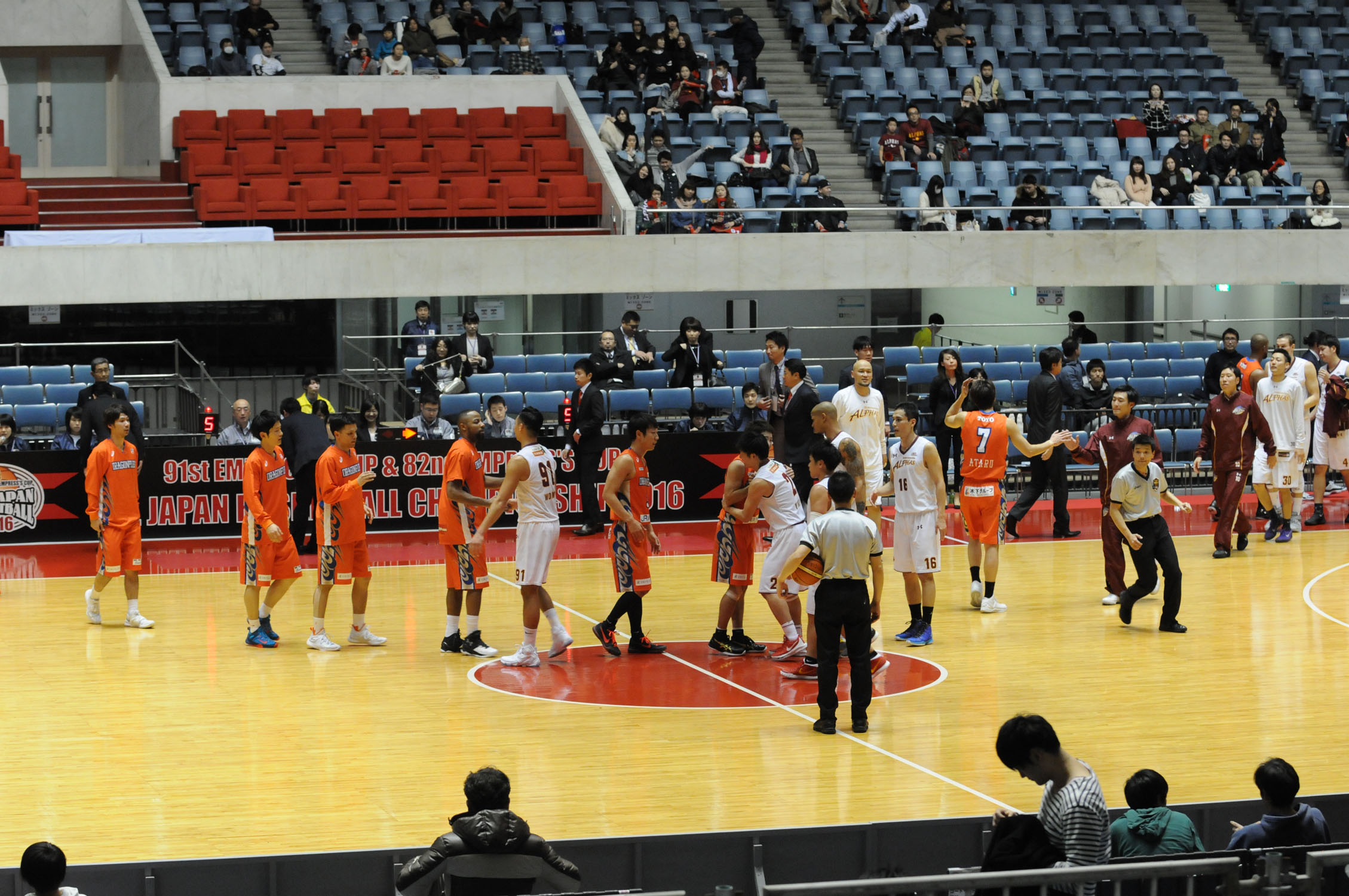 2016年全日本総合バスケットボール選手権大会二回戦、大塚商会アルファーズ対広島ドラゴンフライズ。代々木第一体育館で。